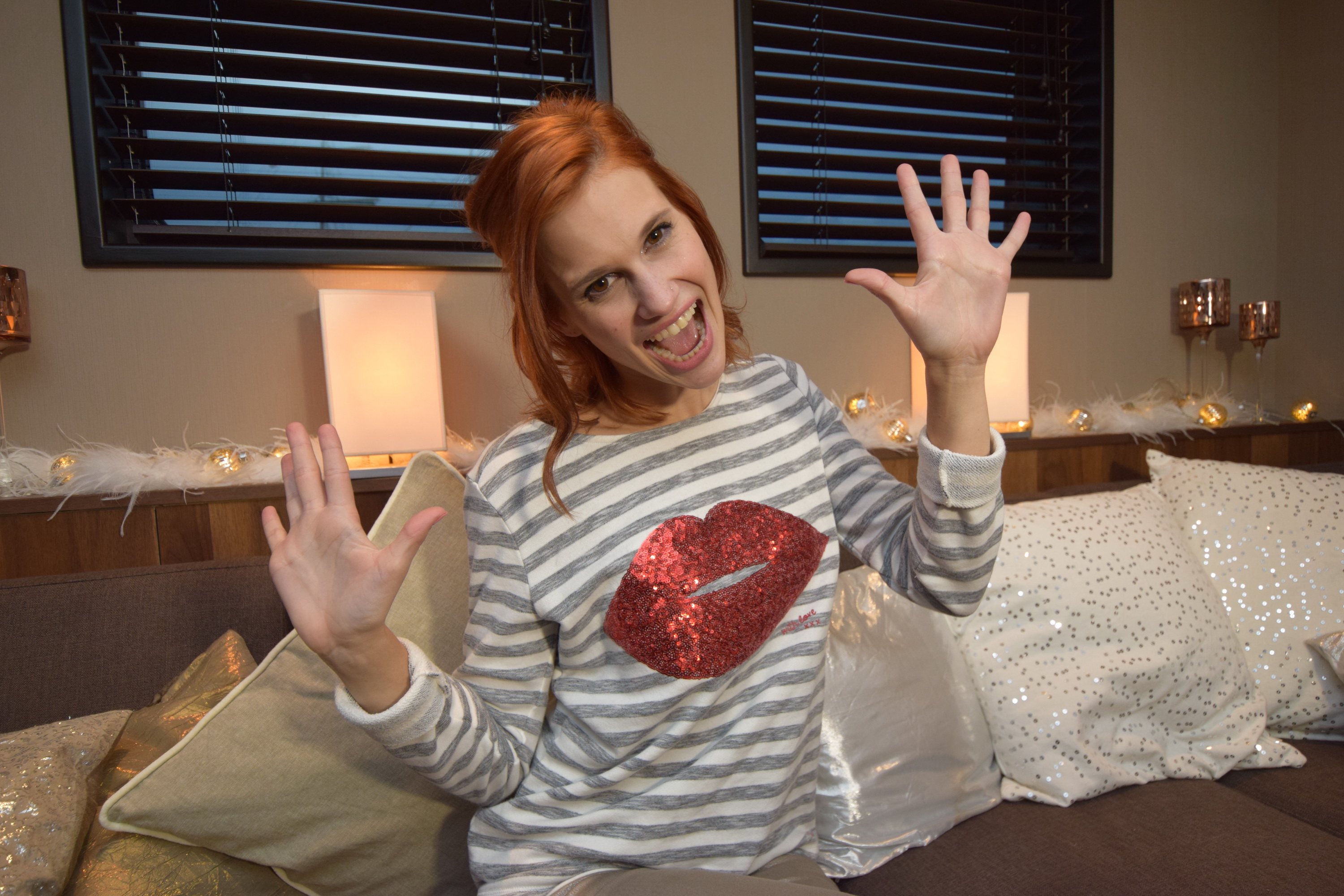 Op woensdag 16 december 2015 gaf de nieuwe K3 interviews naar aanleiding van hun gloednieuwe CD op het jacht Evanna in het Willemdok van Antwerpen.